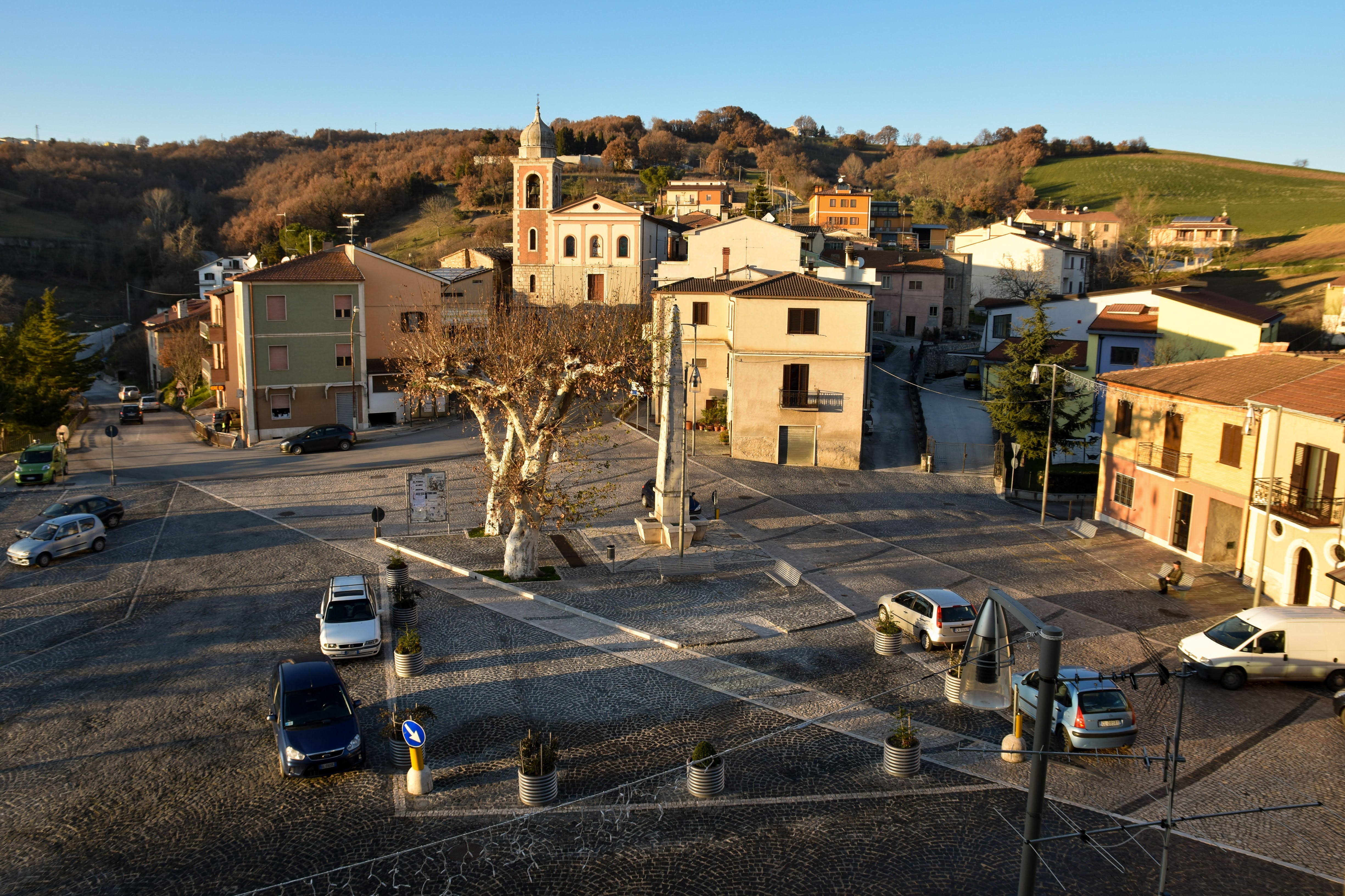 Largo Fontana dalla finestra del palazzo marchesale di Spinete